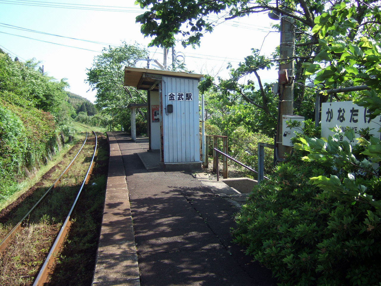 松浦鉄道金武駅（Matsuura Railway Kanatake Station）